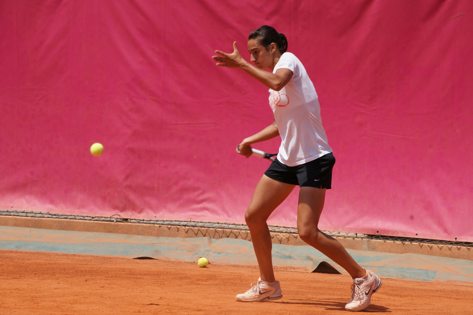 Caroline Garcia, Open tennis Cagnes-sur-Mer, 2012